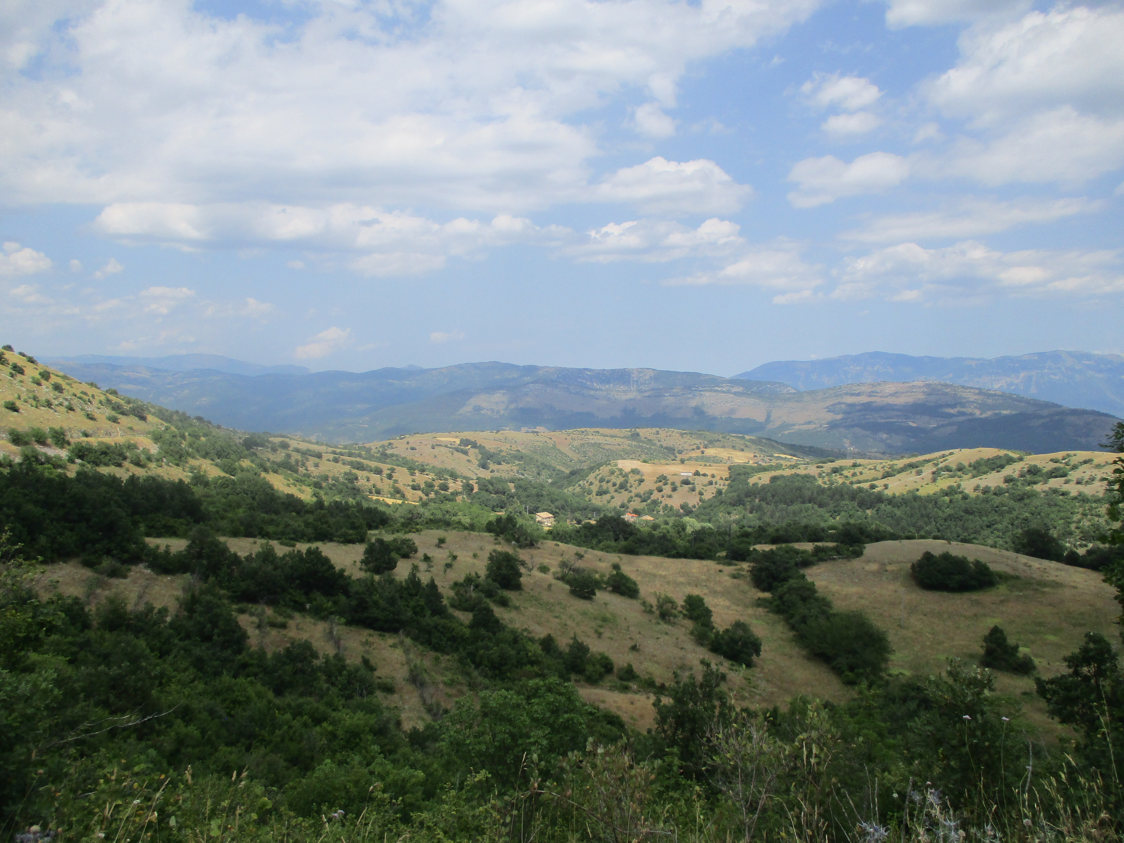 Catena montuosa del Sirente